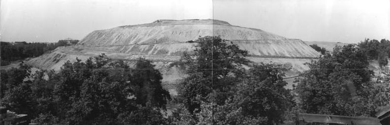 Der "Friedrichshainberg" in Berlin. Der mit Trümmern und Schutt zugeschüttete gesprengte Bunker im Bezirk Friedrichshain ist ein stattlicher Berg geworden. Auf der Kuppe ist bereits der Unterboden für die Muttererde gelegt worden. Aufn.: Illus Kümpfel 6938-50 23.6.50